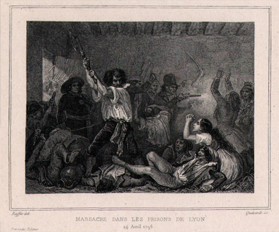 Após a repressão à revolta lionesa contra a Convenção, a 24 de abril de 1795 ocorrem novas atrocidades, durante o chamado Terror Branco